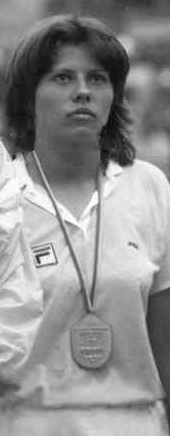 Summer Universiade in Bucharest. Virginia Ruzici and Florența Mihai (right)